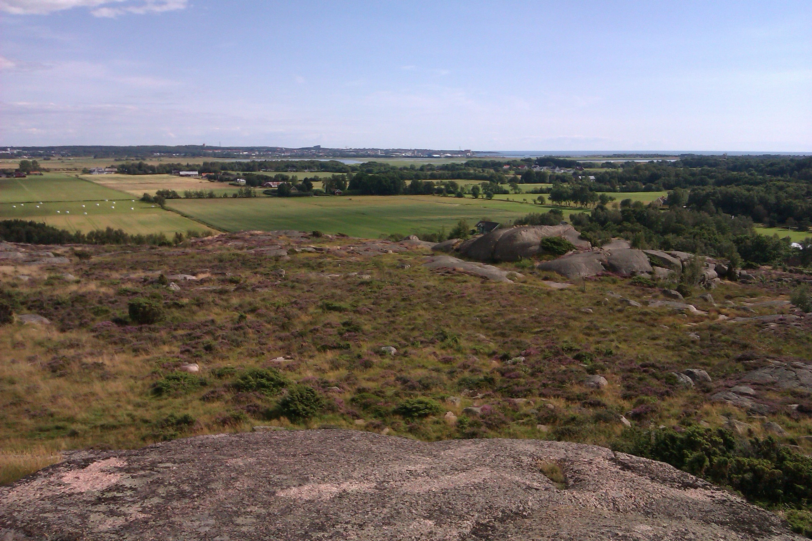 Naturreservatet Gamla Varberg, Varbergs kommun.